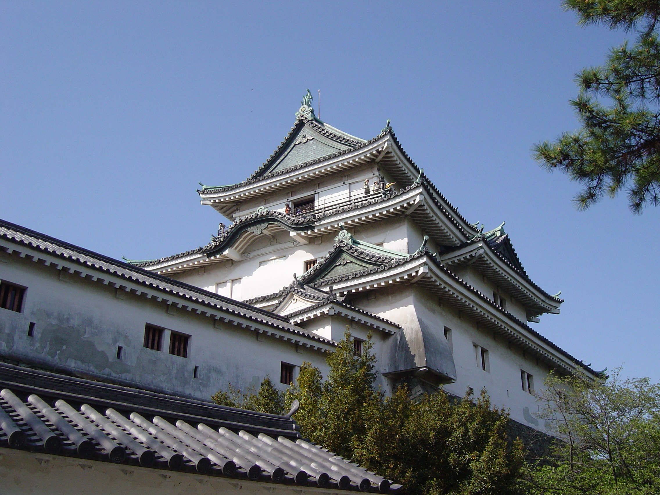 2006/5/3撮影の和歌山城大天守。